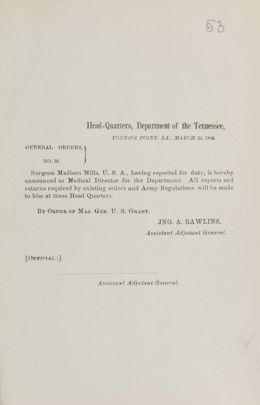 General orders. No. 18